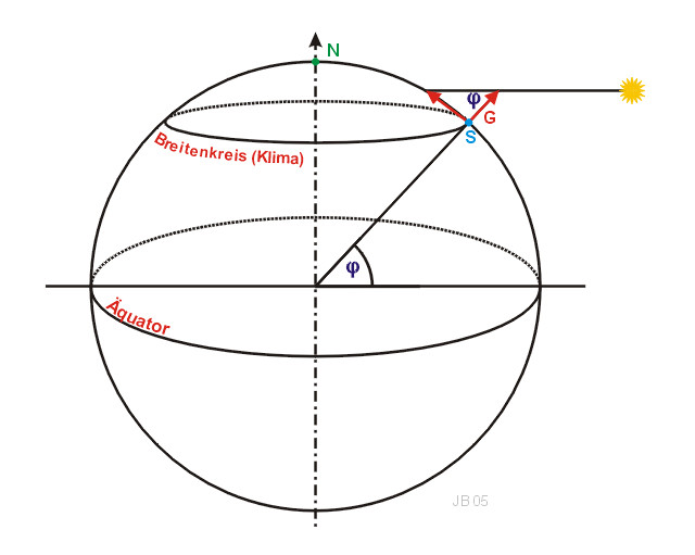 Gnomon und geografische Breite